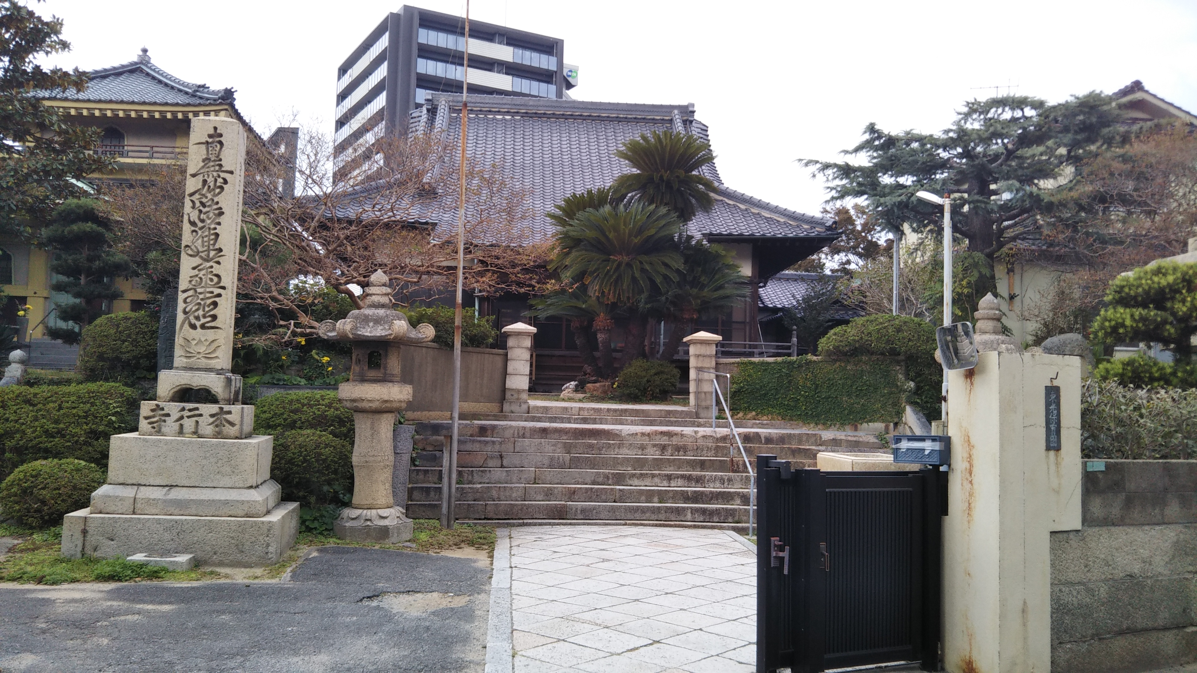 山口県下関市赤間町にある本行寺。2019年11月10日に撮影。